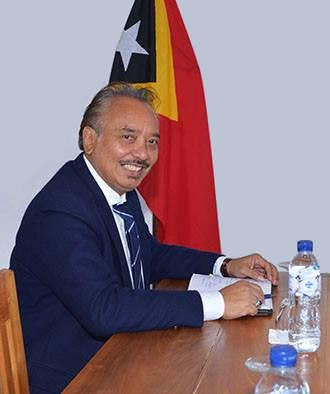 Francisco Kalbuadi Lay, Tourismusminister Osttimors